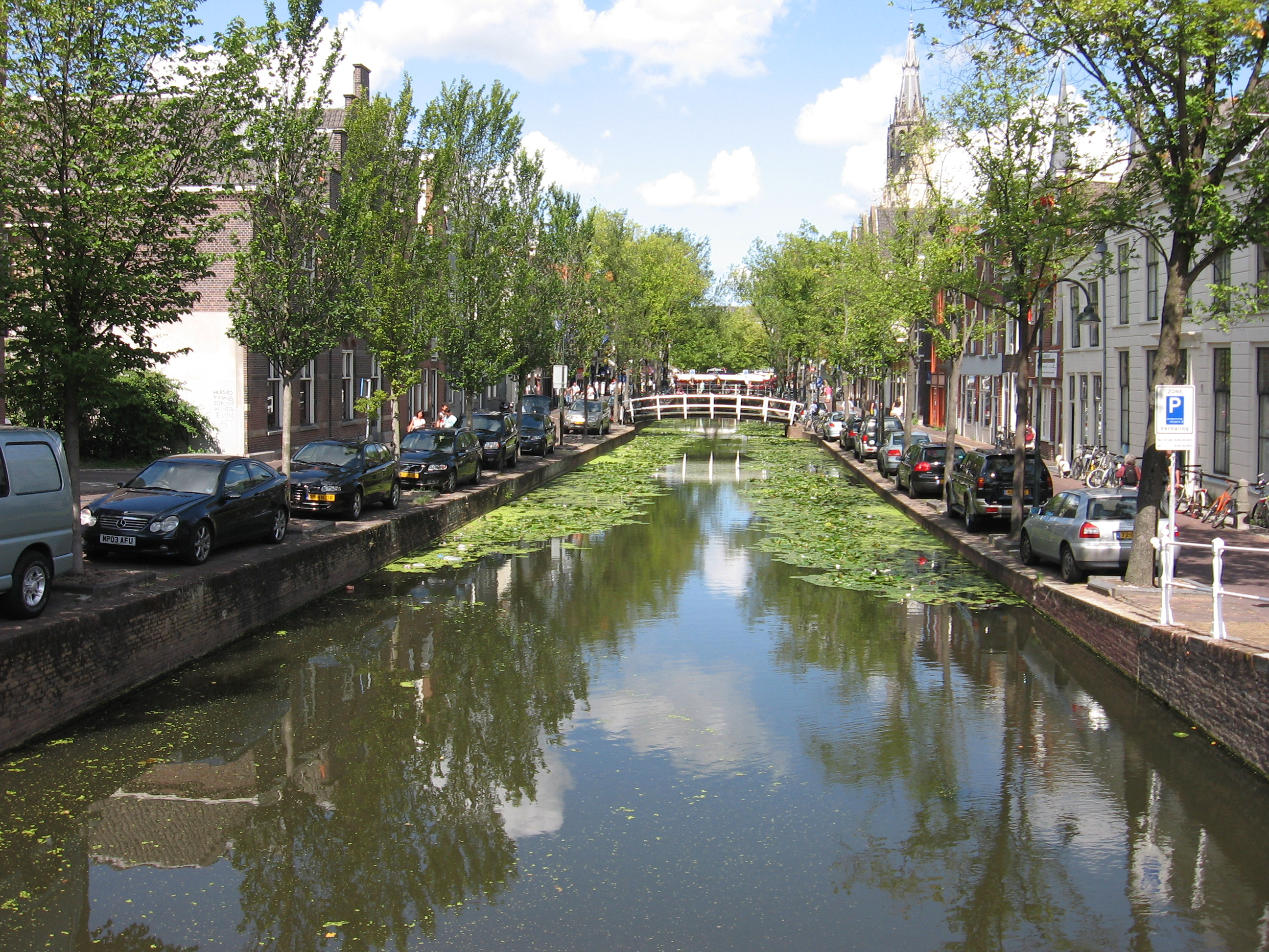 Delft - Brabantse Turfmarkt.jpg